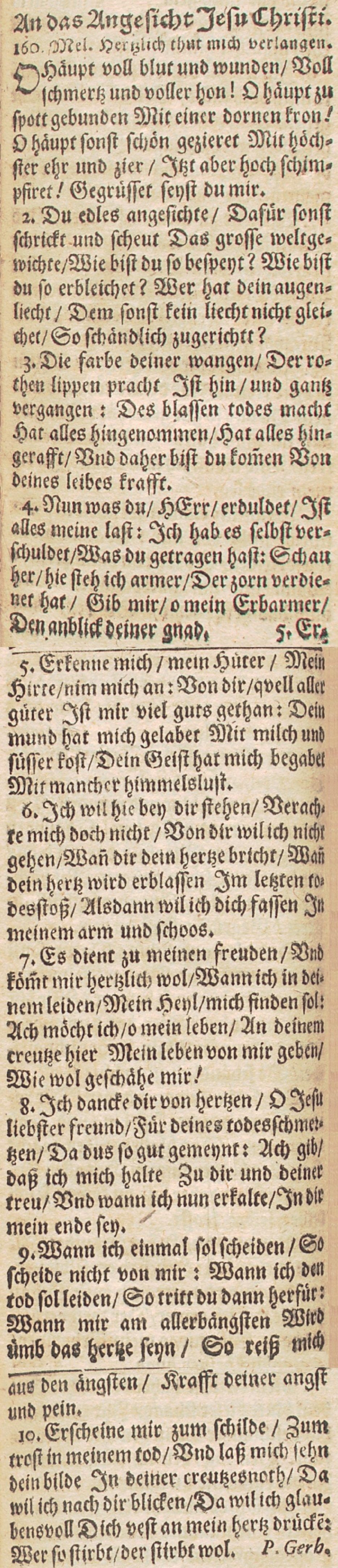 O Haupt voll Blut und Wunden, Druckfassung 1660